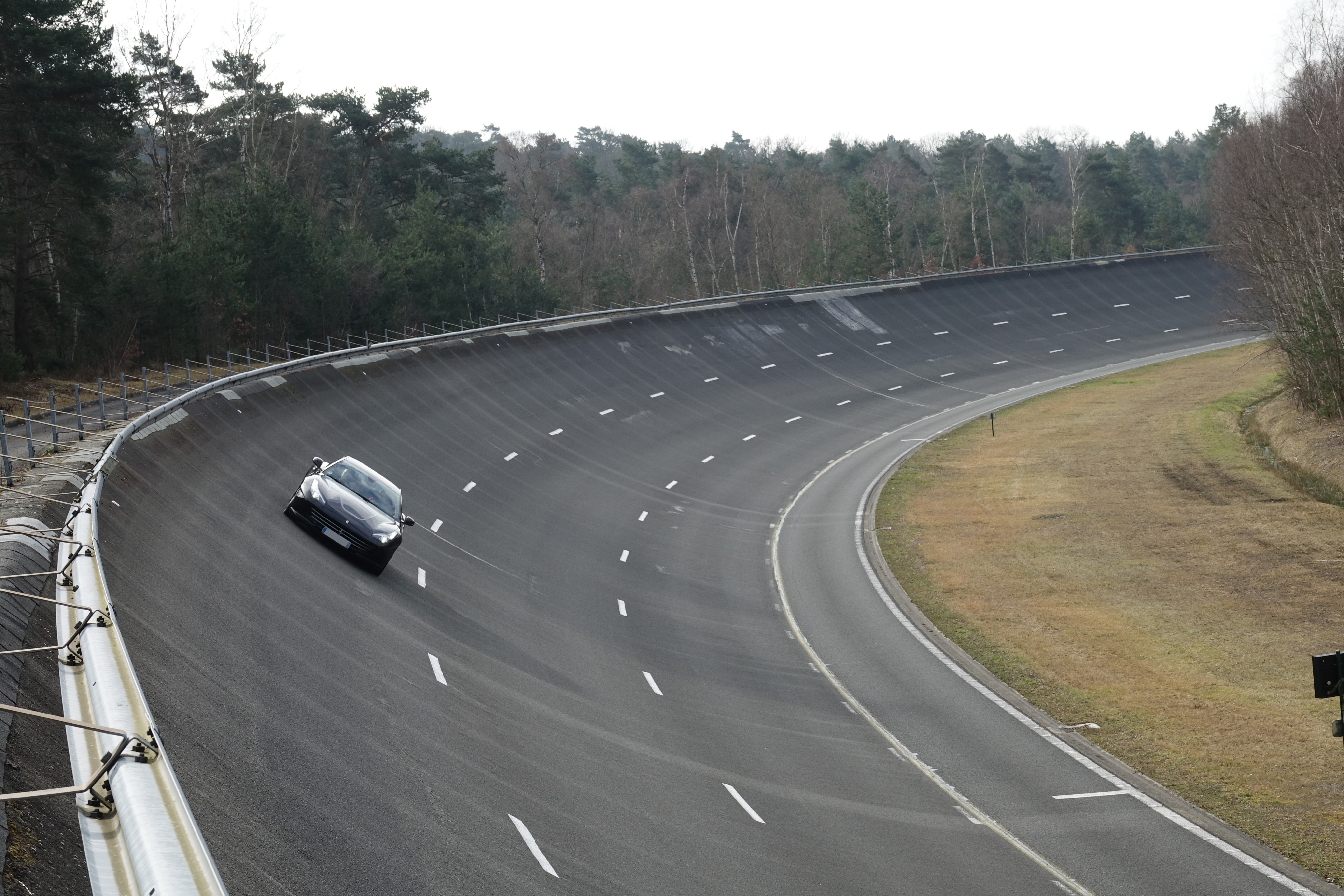 Circuit de Mortefontaine (CERAM)